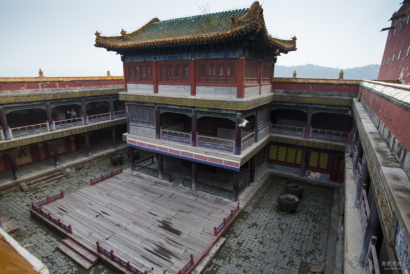 中文（中国大陆）: 被用于《普陀之光》歌舞演出的御座楼